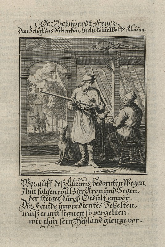 Original image description from the Deutsche Fotothek Ständebuch & Handwerk & Schleifer & Schwert & Schmied